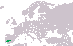 Distribution of Anaecypris hispanica, based on: DOADRIO, I., ELVIRA, B., BERNAT, Y.: Peces Continentales Españoles. Inventario y clasificación de zonas fluviales. Icona, 1991.